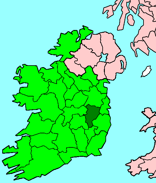 Kildare